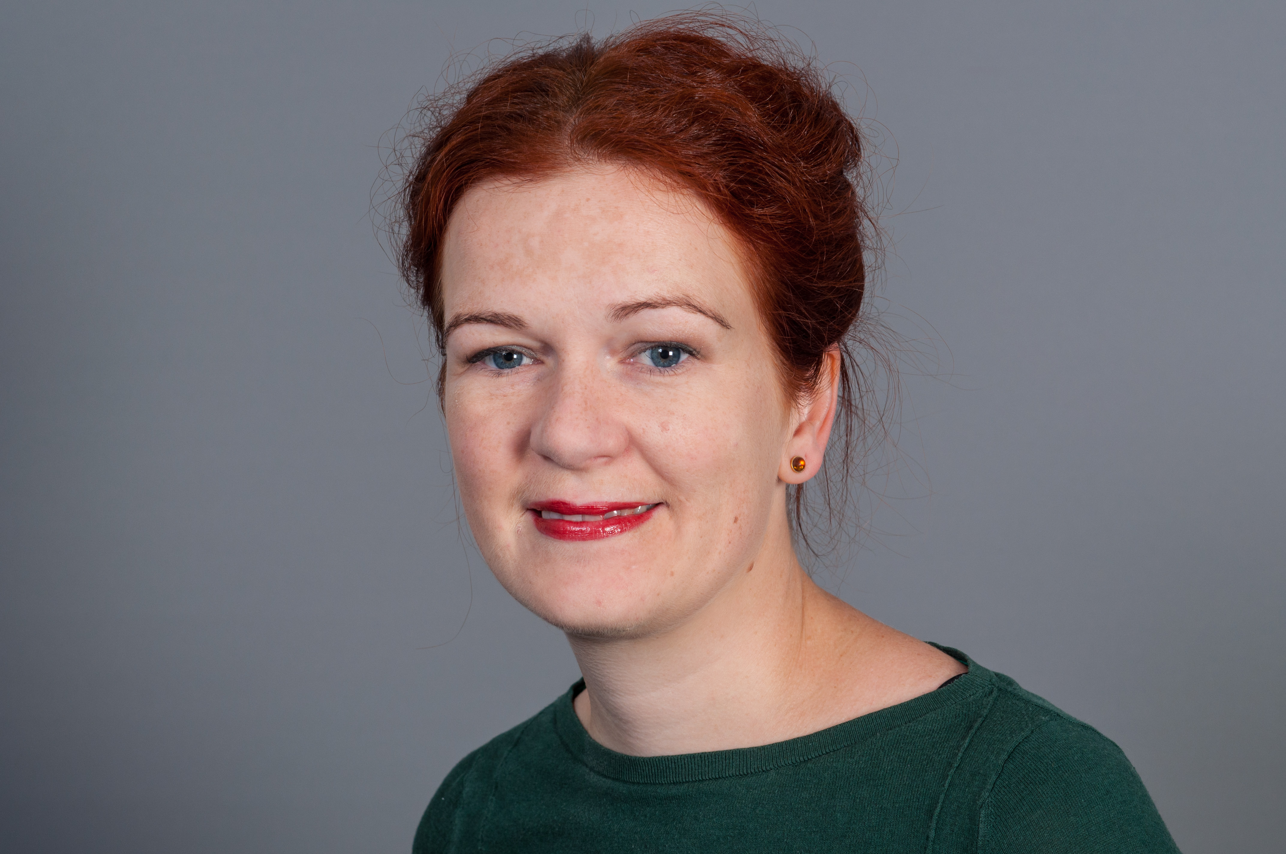 Katja Dörner (Bündnis 90/Die Grünen), MdB